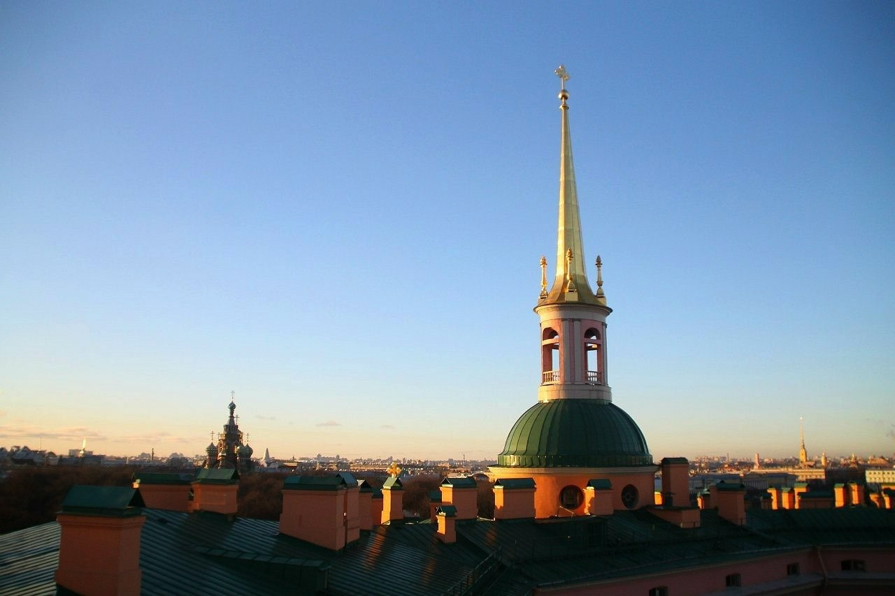 Замок: Садовая улица, 2, Центральный район, Санкт-Петербург